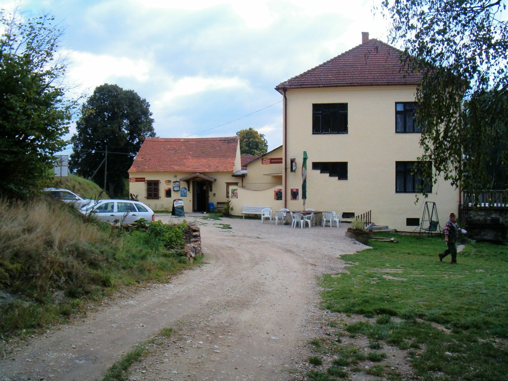 Česky: Hadrův (Spálený) mlýn na Moravské Dyji u Vnorovic